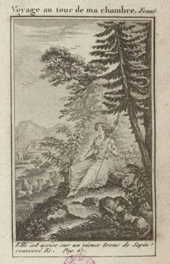 Frontispice du Voyage autour de ma chambre de Xavier de Maistre, édition de Dufart, Paris, 1796 [1] Légende : Elle est assise sur un vieux tronc de sapin renversé, &c Page 67